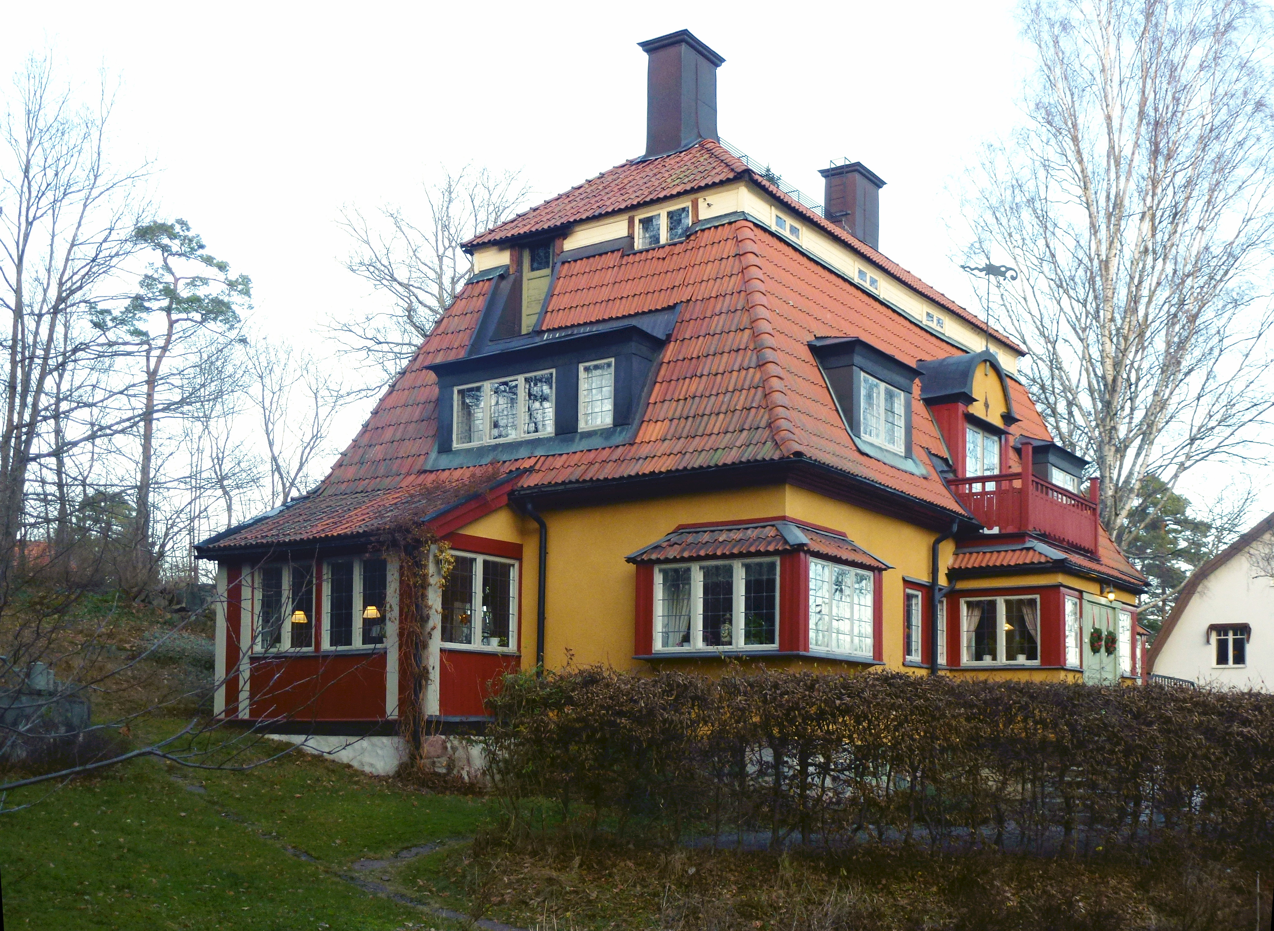 Villa Wållgren, Prästghårdsvägen 1, arkitekt Ivar Callmander